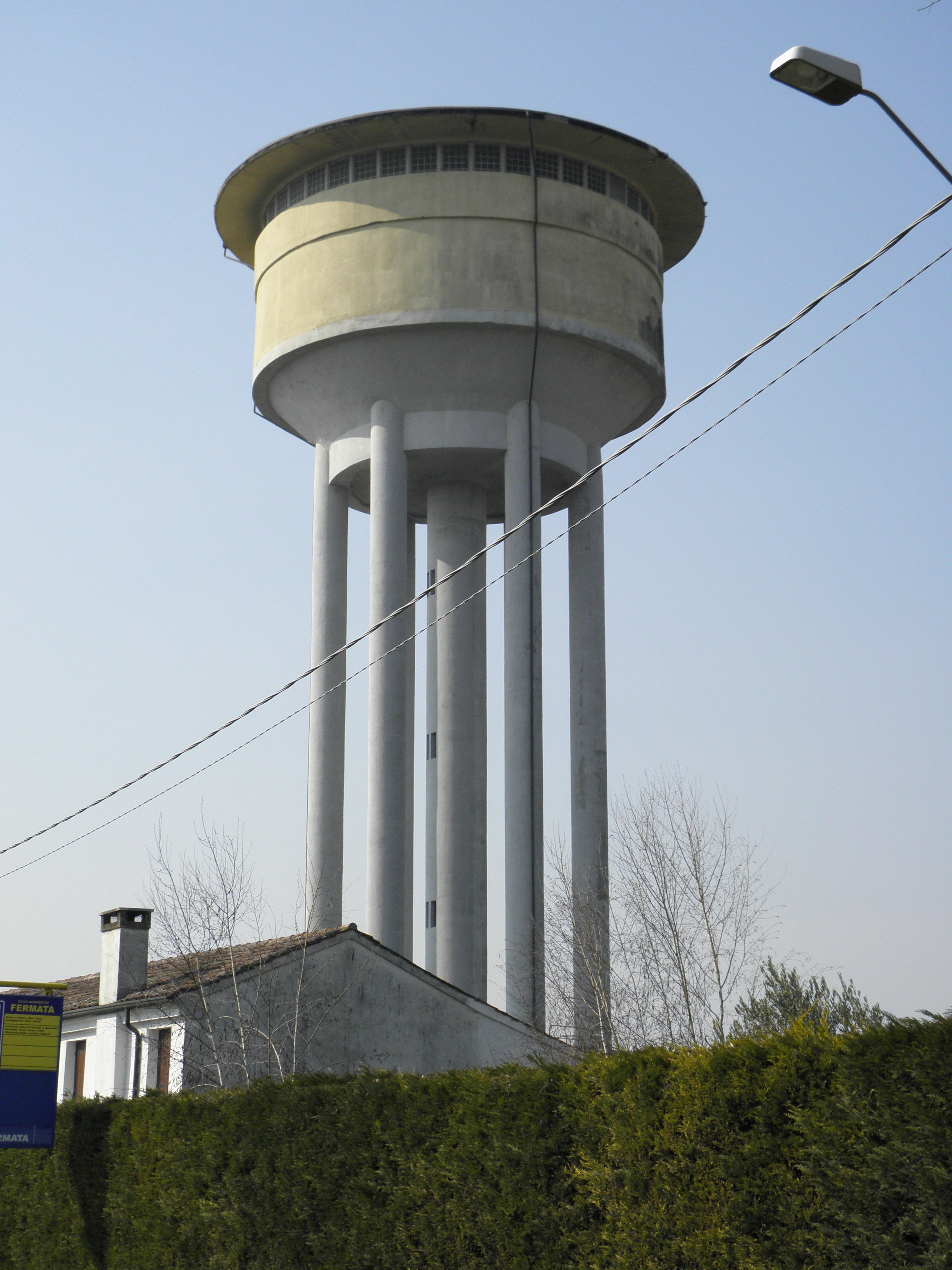 Lendinara: torrino piezometrico sito in Riviera 4 Novembre.